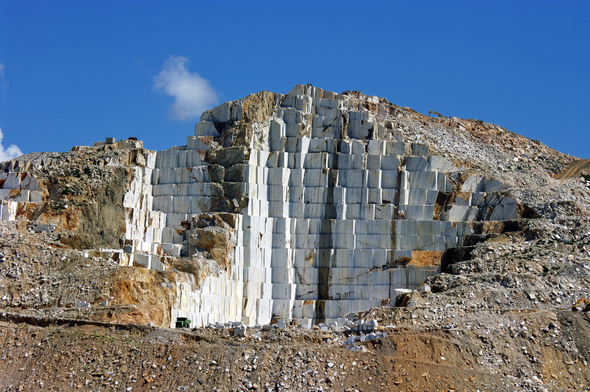 Marmorsteinbruch "Alexander", Kinidaros Naxos